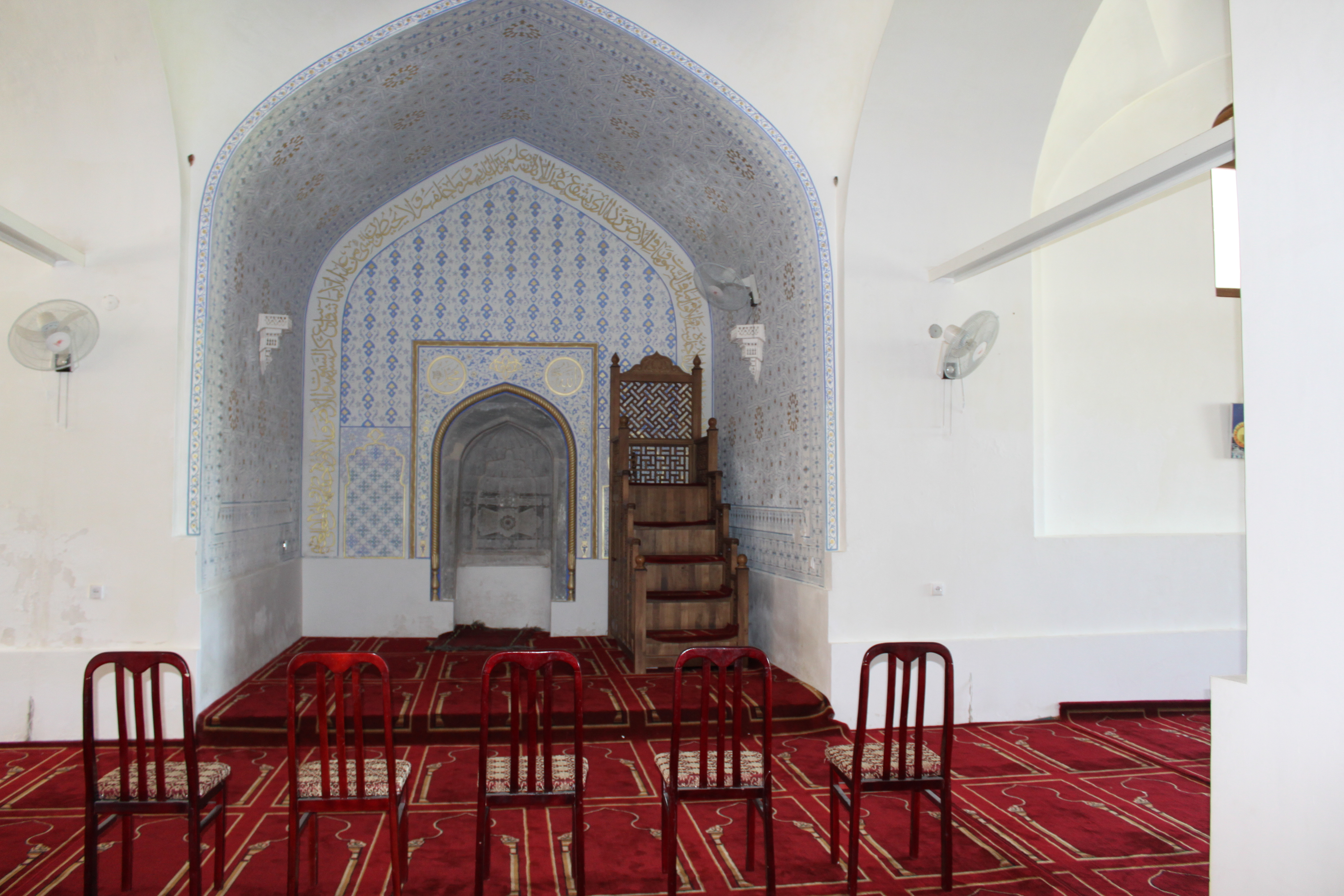 Miharab de la mosquée Panjvakhta sur le site de la source Tchachma à Nourata